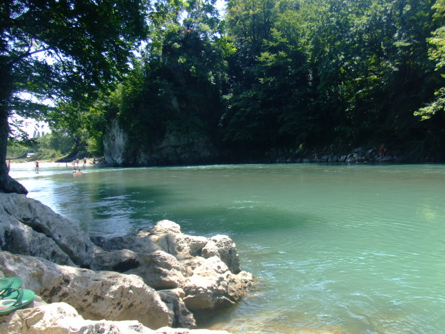 Nokalakevi, river Tekhura